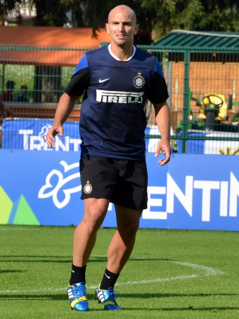 Esteban Cambiasso in allenamento a Pinzolo durante il ritiro estivo 2013.